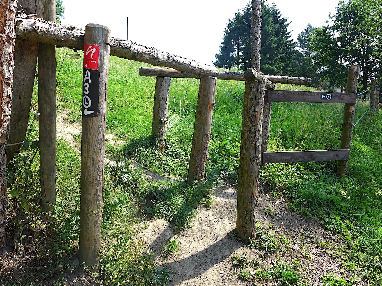 Этап "Невигес-Нордрат" маркированного турмаршрута "Тропа Неандерланд", Северный Рейн-Вестфалия, Германия.